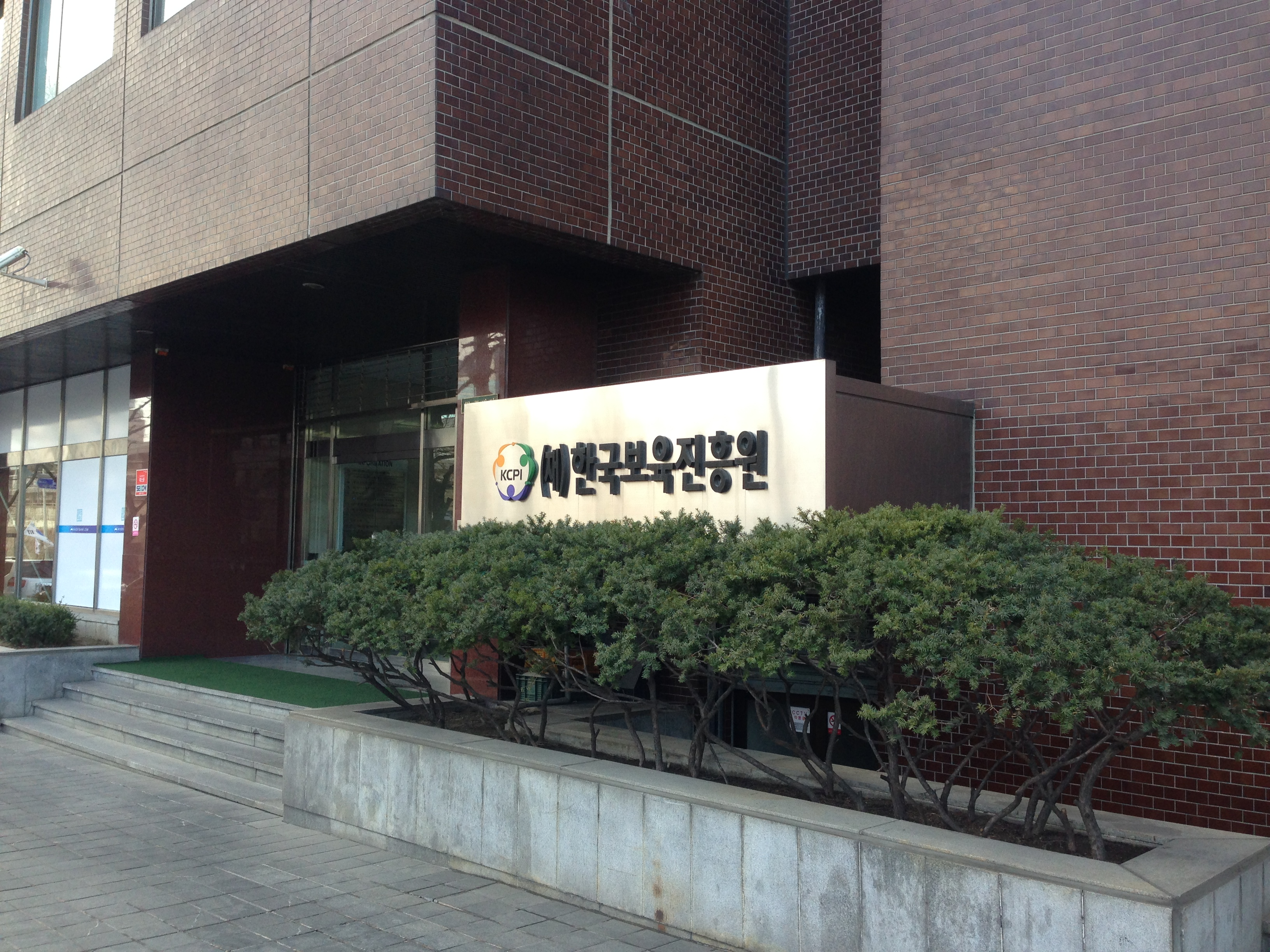 20150226한국보육진흥원 소방안전교육